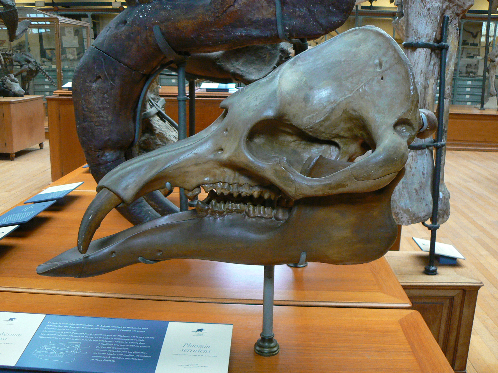 Phiomia serridens